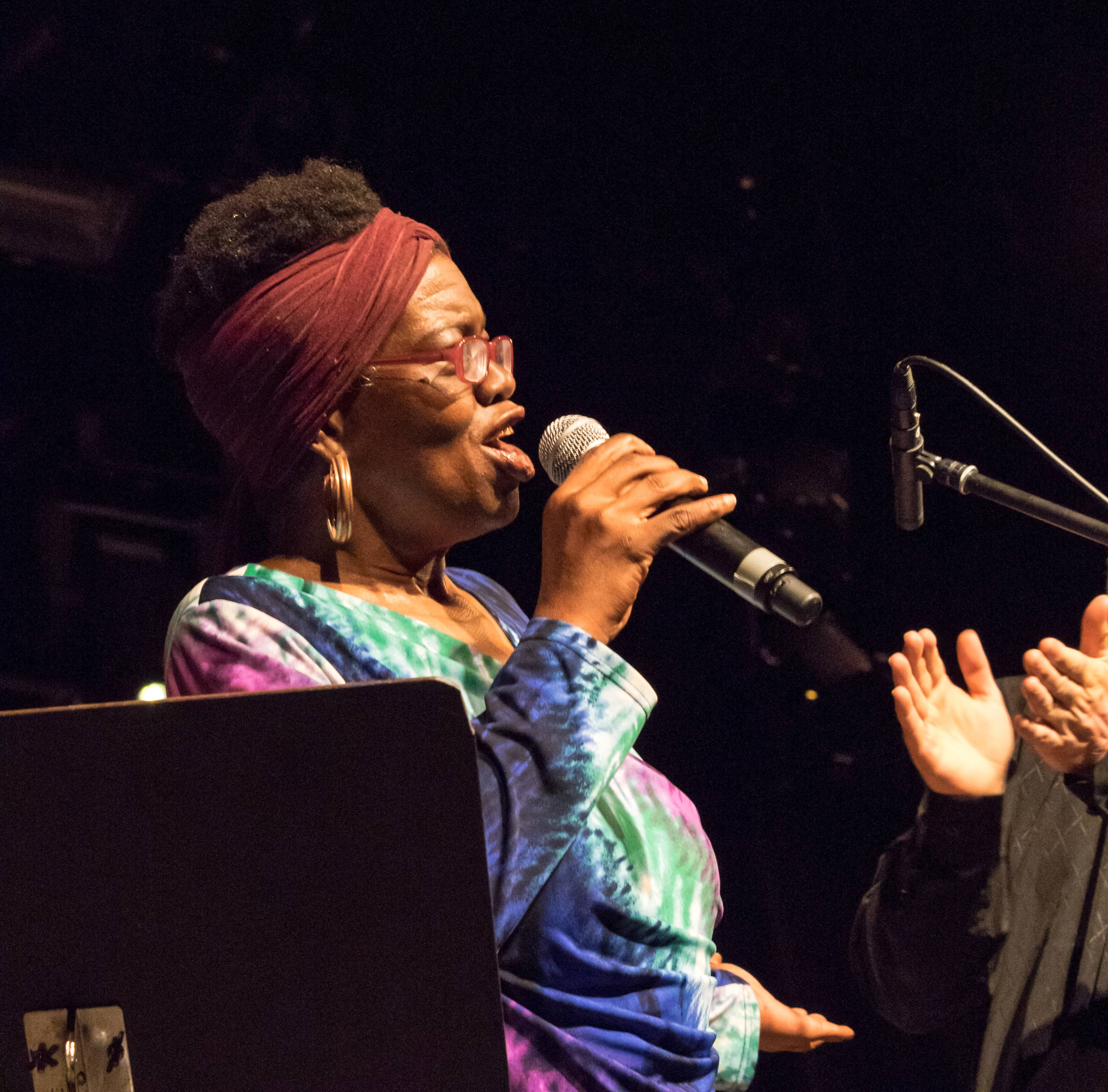 Bilder vom ZMF 2015 Die Gala am 12. 07. 2015